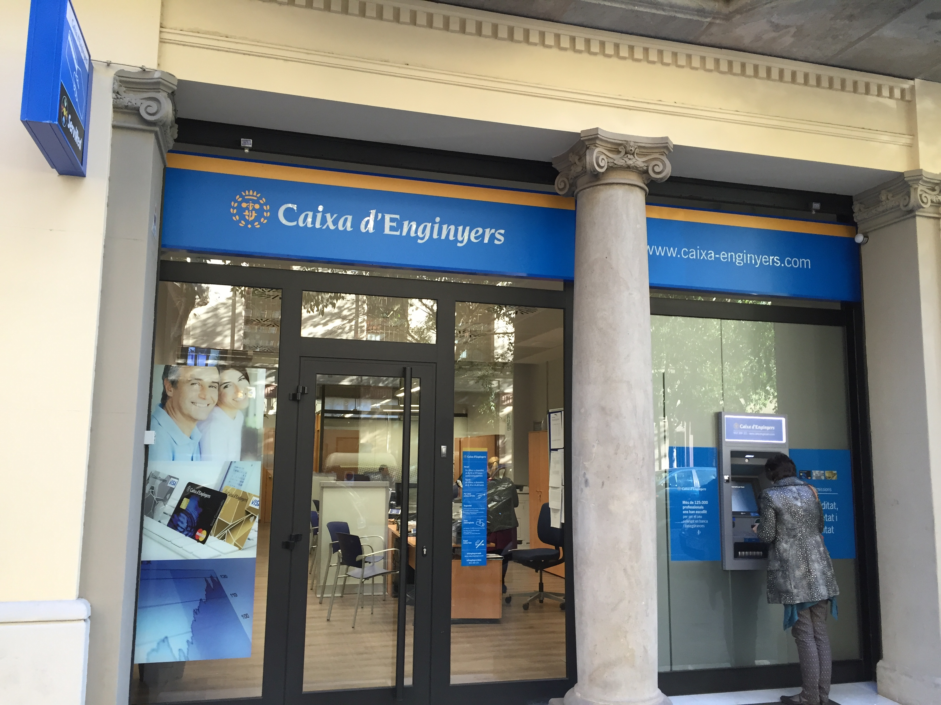 caixa d'enginyers 2015